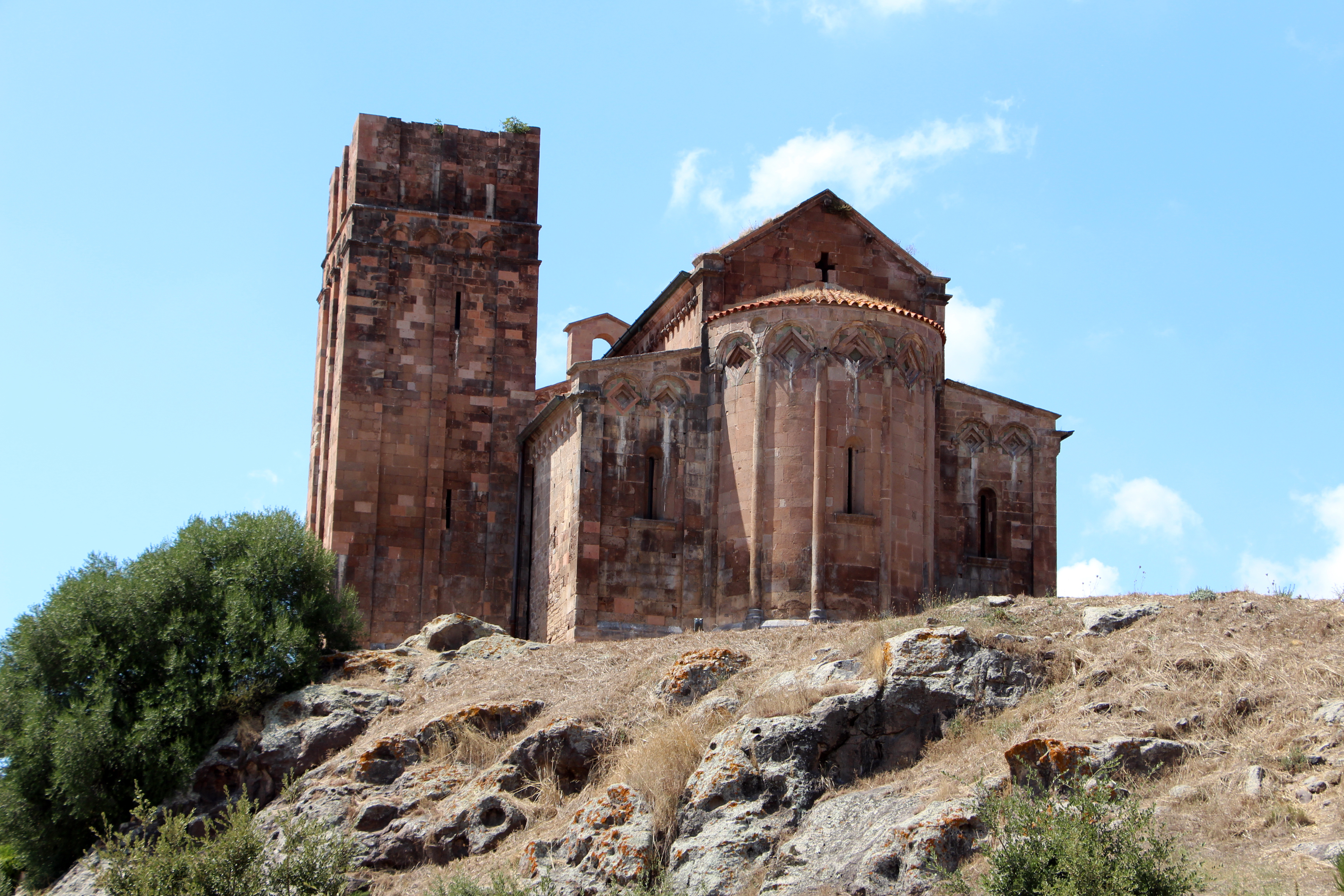 Sant'Antioco di Bisarcio (Ozieri)